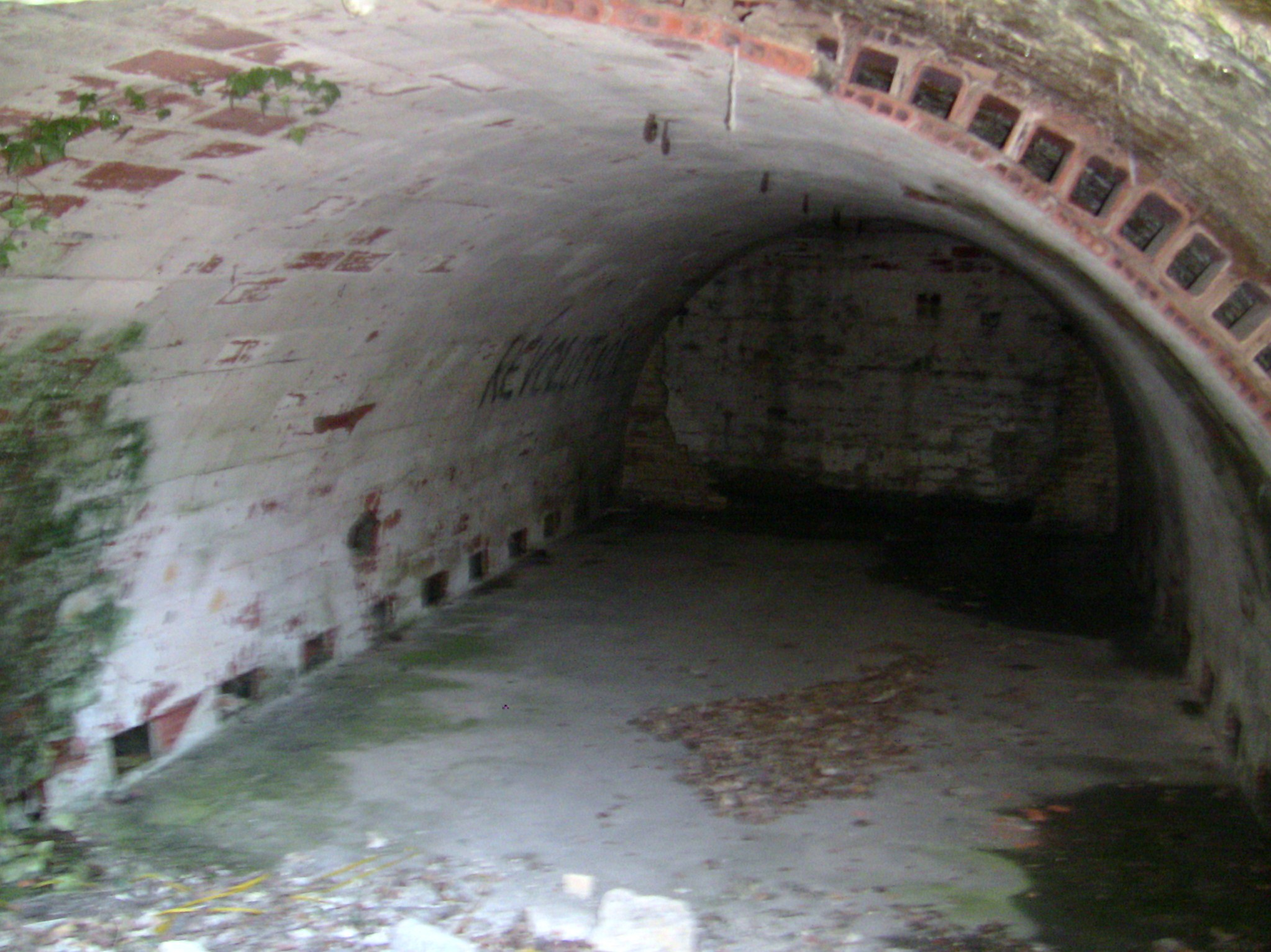 La chambre gauche de l'abris caverne de la carrière, annexe du fort de Planoise à Besançon (Doubs, France).